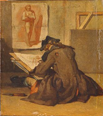 Tecknaren